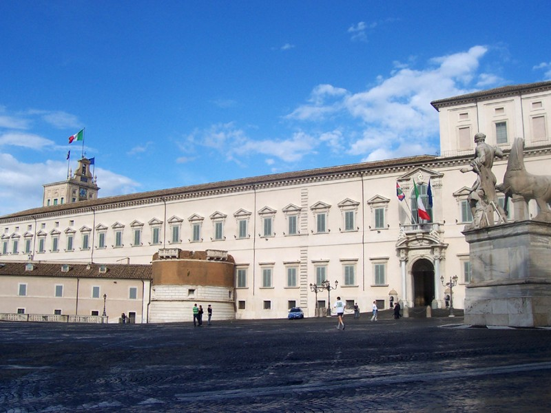 Roma - Palazzo del Quirinale